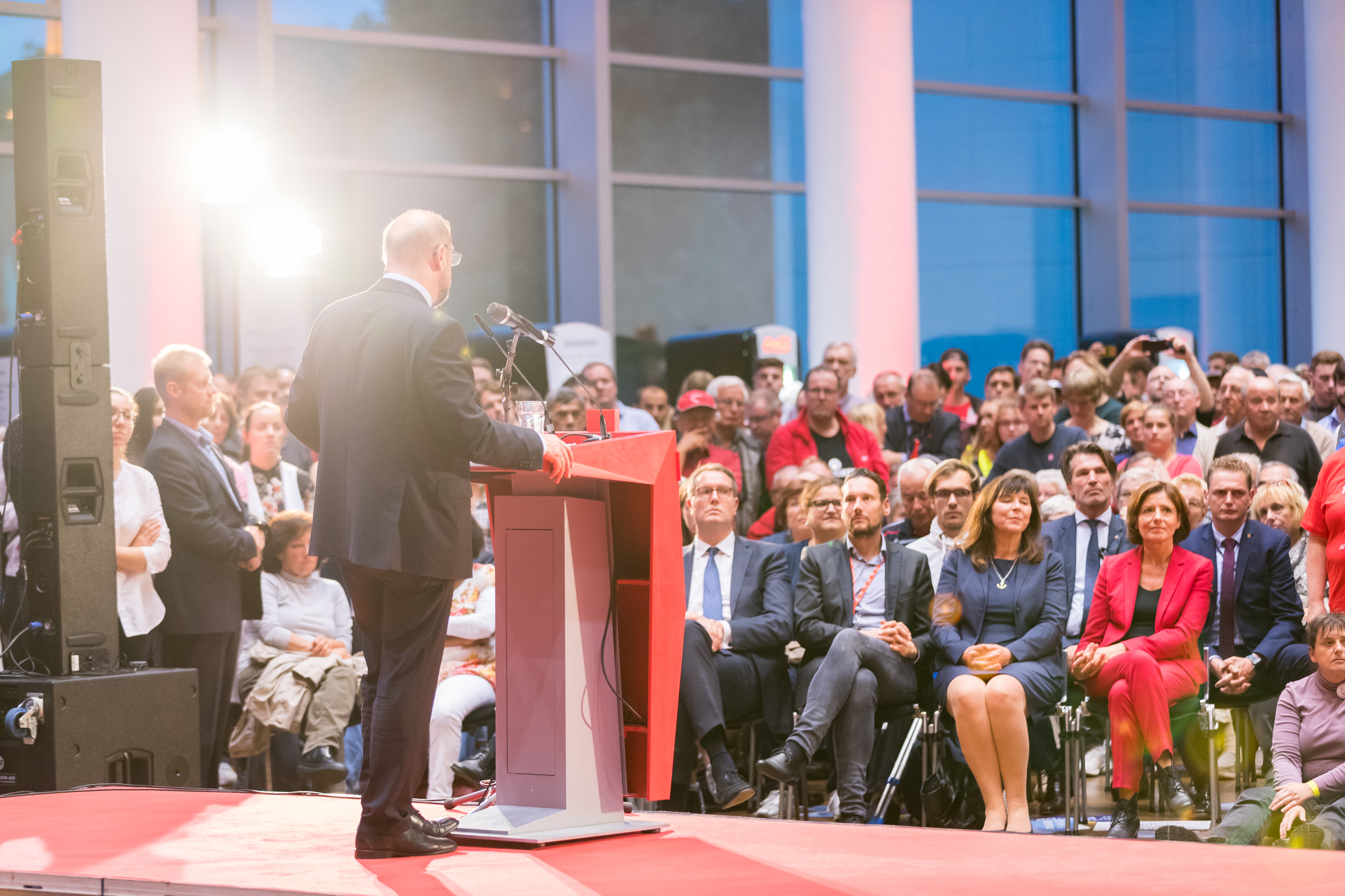 Martin Schulz during SPD Wahlkampf Ludwigshafen at Pfalzbau, Ludwigshafen, Rheinland-Pfalz, Germany on 2017-09-13, Photo: Sven Mandel